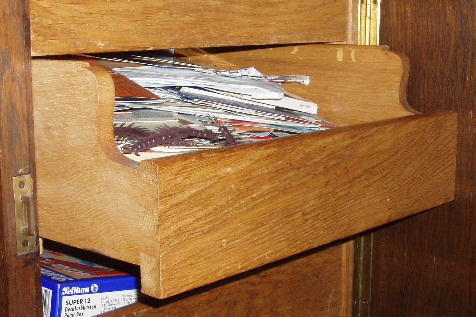 englischer Zug